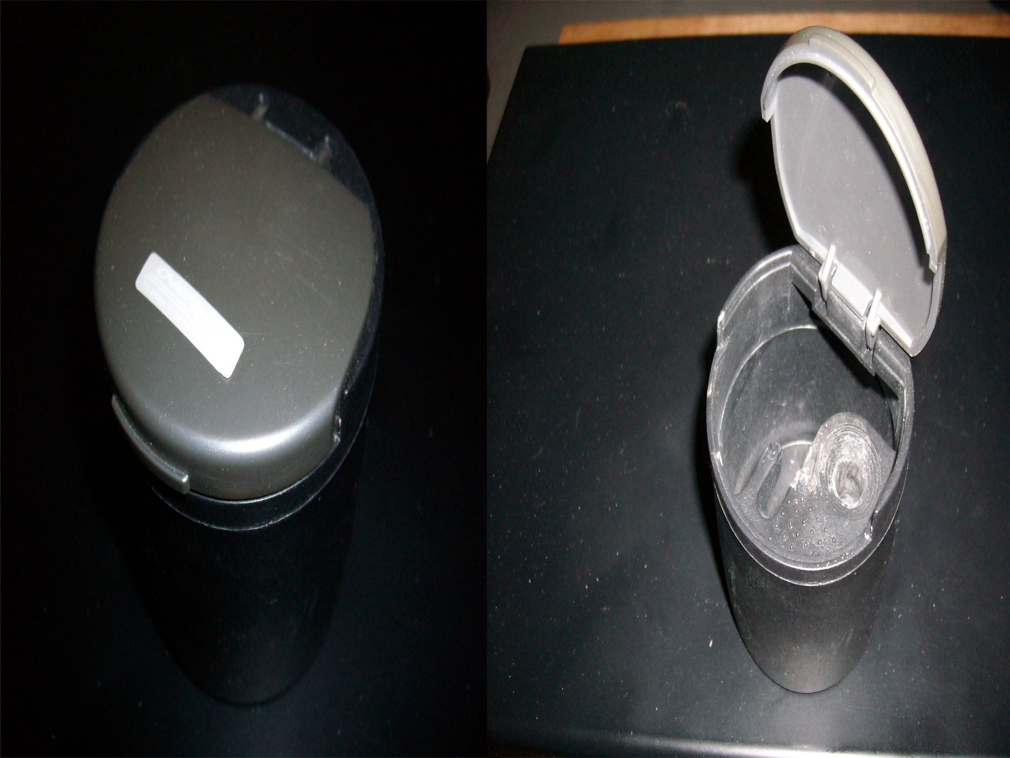 私物です。